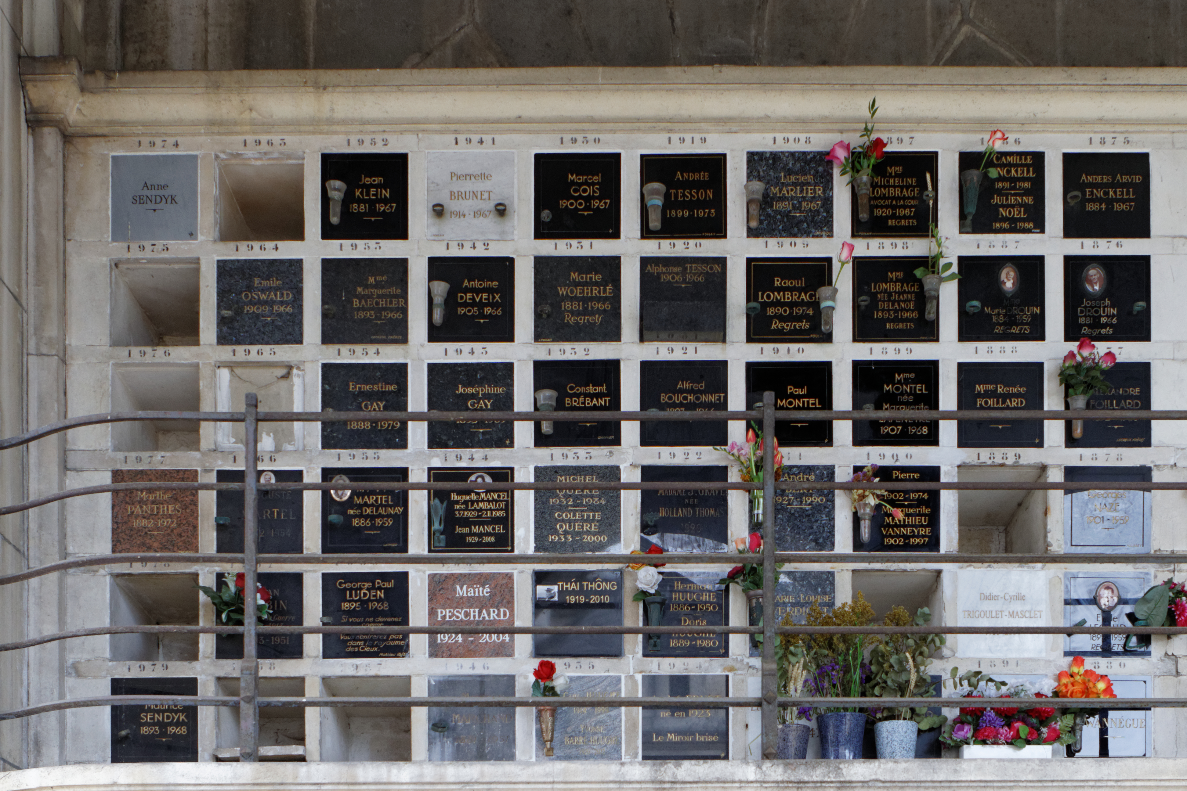 Cases du columbarium du cimetière du Père-Lachaise.